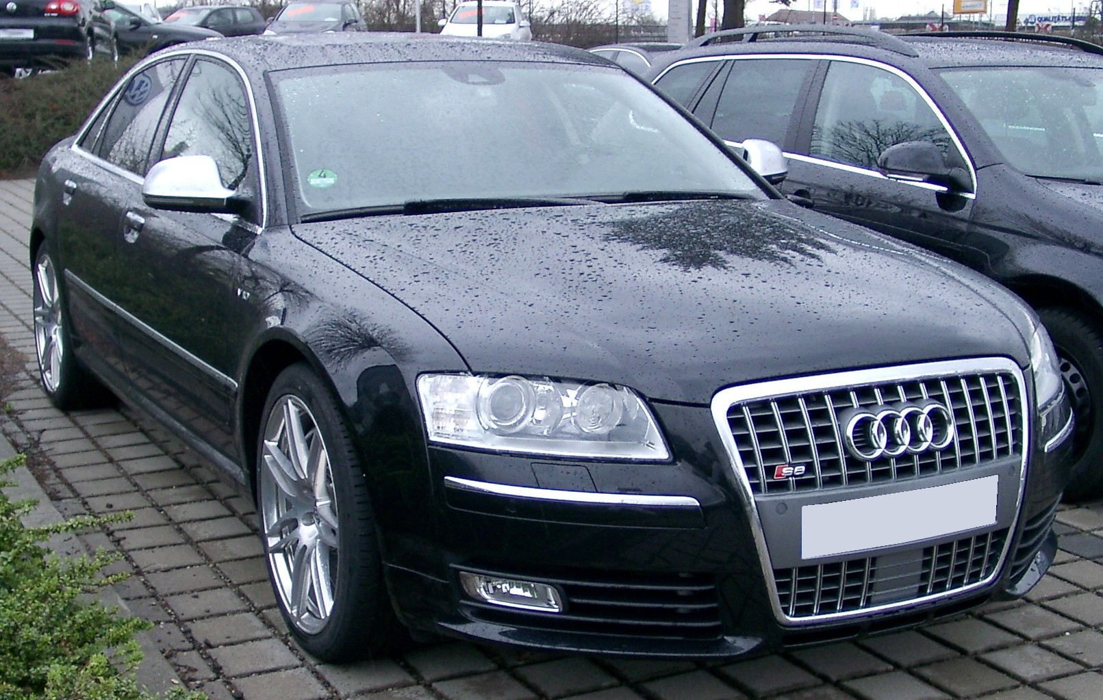 Audi A8, Version S8